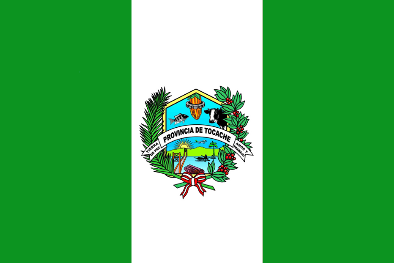 Bandera de la provincia de Tocache (San Martín, Perú)